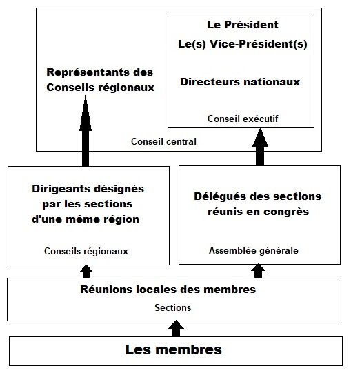 L'instance locale du RIN est la section, où se réunissent les membres. Les sections désignent leurs délégués à l'Assemblée générale et sont chapeautées par des Conseils régionaux. L'Assemblée générale, qui est l'autorité suprême du RIN, élit les membres du Conseil exécutif. Ces derniers forment avec les représentants des Conseils régionaux le Conseil central du RIN. Le Conseil central dirige le RIN entre chaque réunion de l'Assemblée générale.